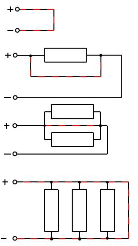 short circuit examples